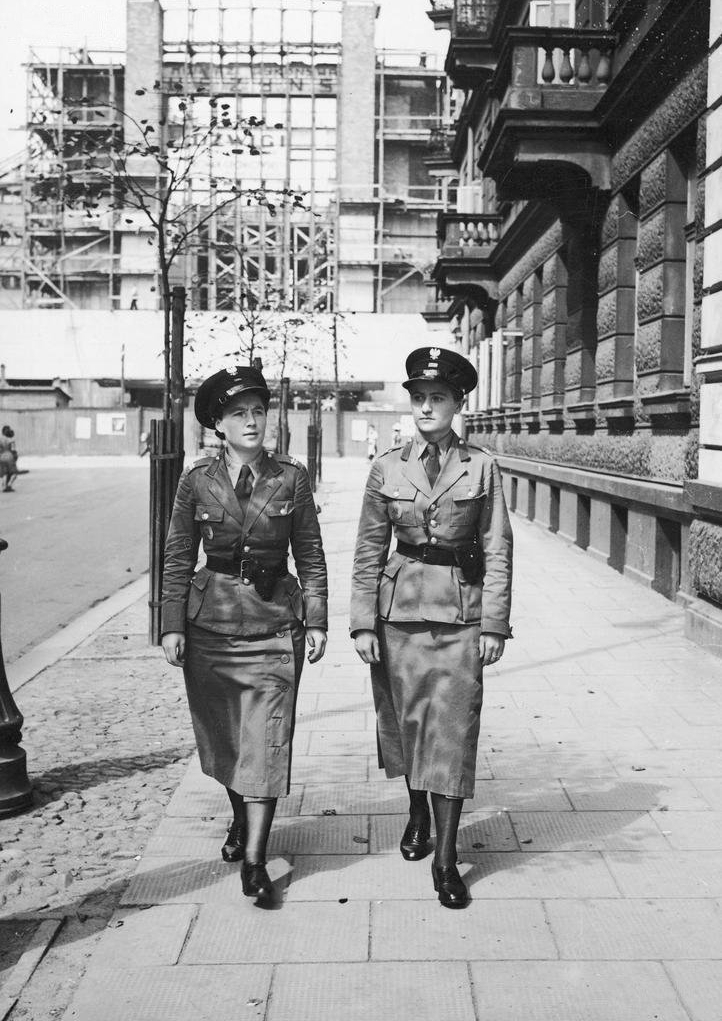 Dwie funkcjonariuszki Policji Kobiecej przy ulicy Pankiewicza w Warszawie, w sierpniu 1939. Po prawej gmach Hotelu Central (Al. Jerozolimskie 47) oraz fragment kamienicy przy Pankiewicza 4. W tle widoczna budowa hallu Dworca Głównego.